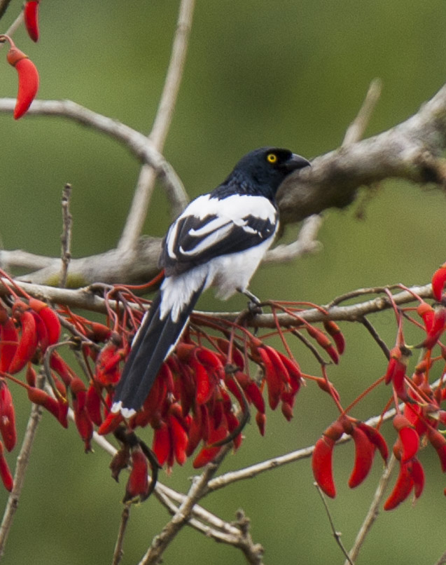 Magpie Tanager - Manu NP - Perù_8577